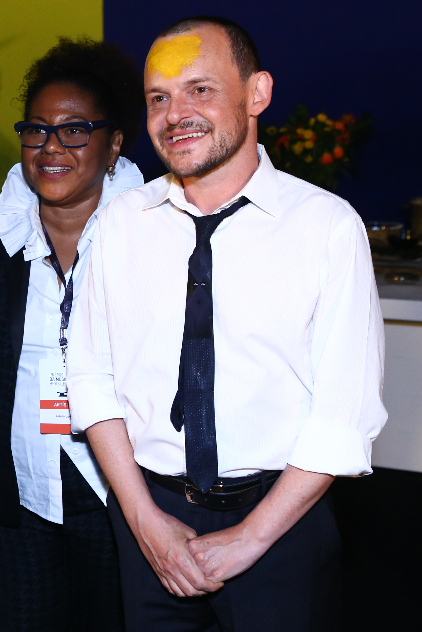 Matheus Nachtergaele - 26° Prêmio da Música Brasileira 2015, no Theatro Municipal, no Centro do Rio de Janeiro/RJ. (10/06/15) Foto: Raphael Mesquita/Divulgacão